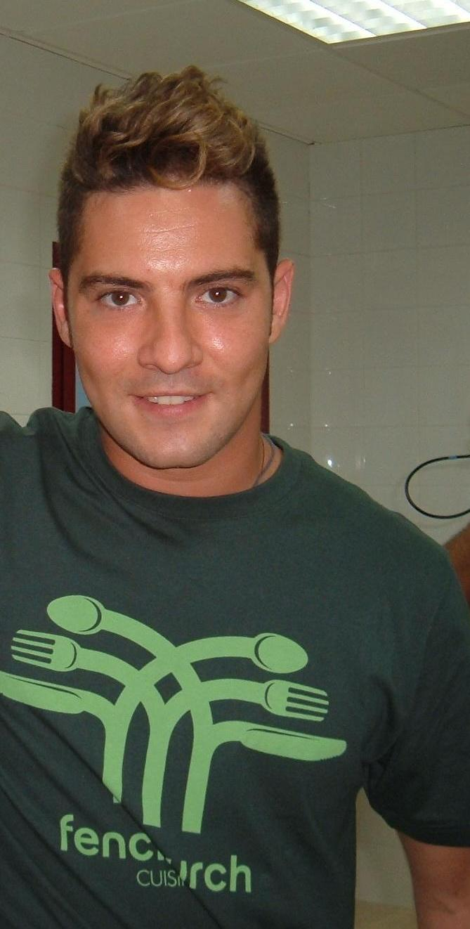 Fotografía del cantante español David Bisbal.